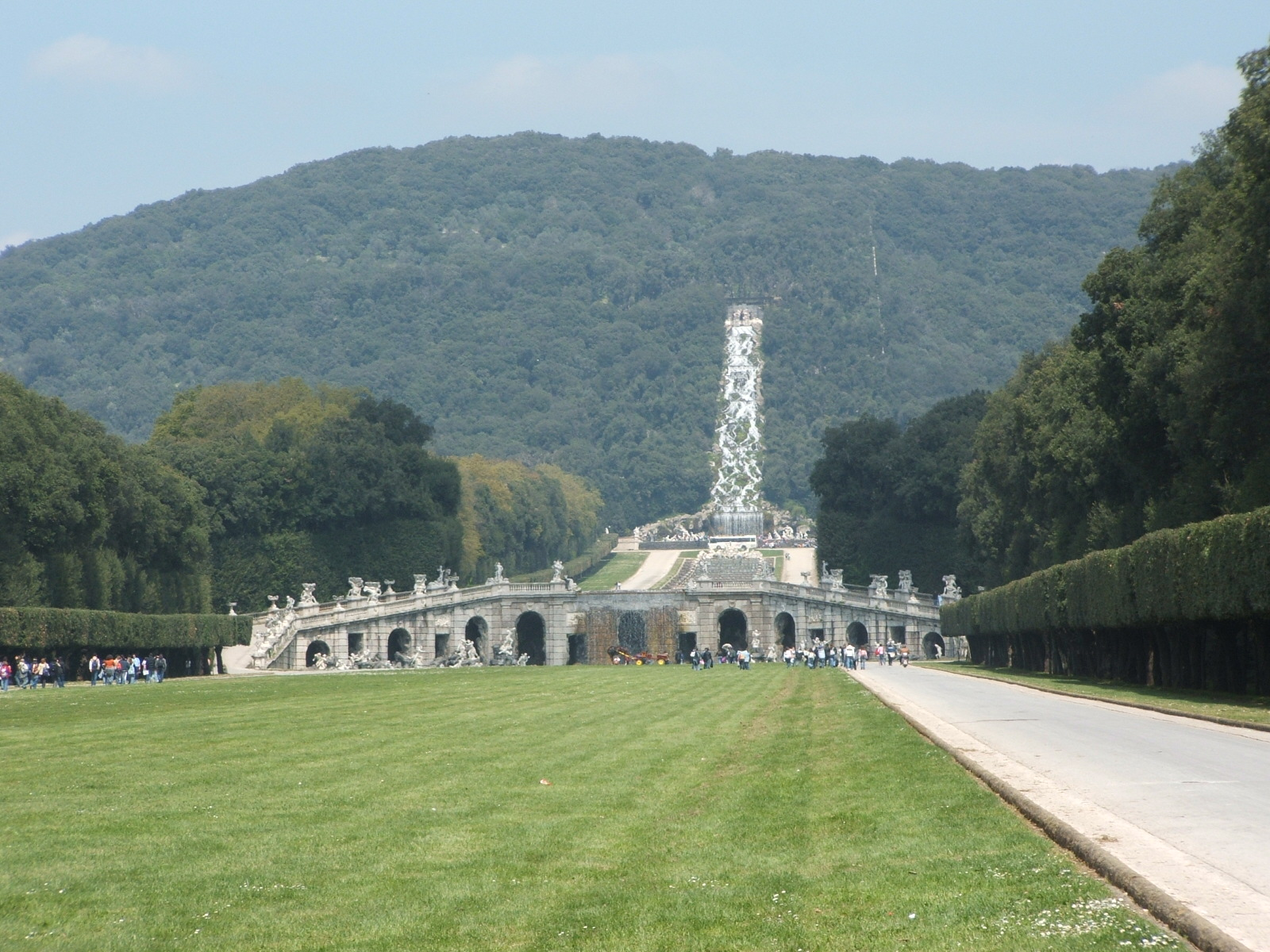 Immagine dalla Reggia di Caserta, Caserta, Campania, Italia. Il Parco